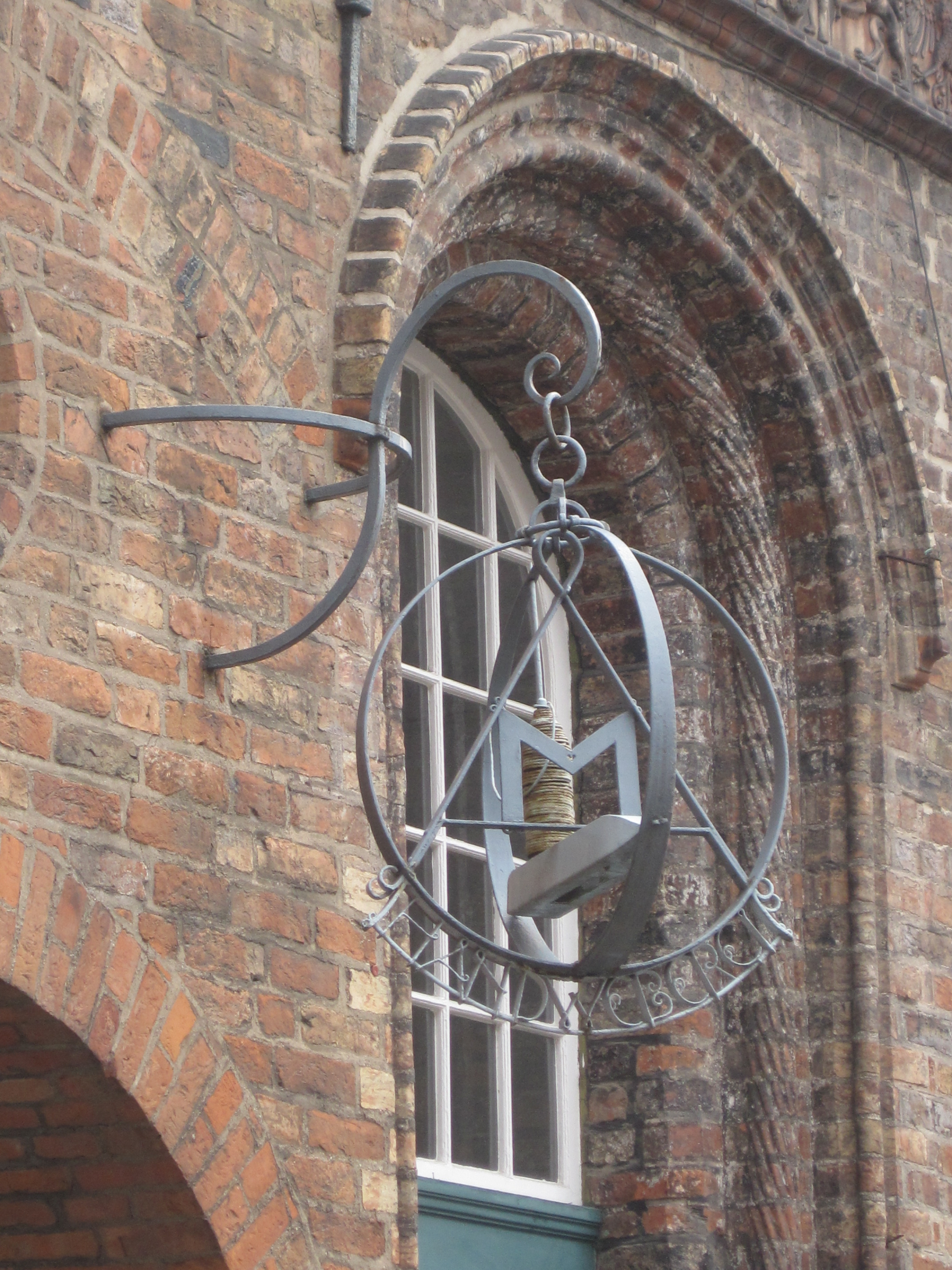 Nasenschild der Weberin Alen Müller am Zollhaus des Lübecker Burgtors.